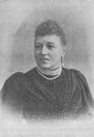 Баронесса Вера Илларионовна Мейендорф, ур. Васильчикова (1847—1924)